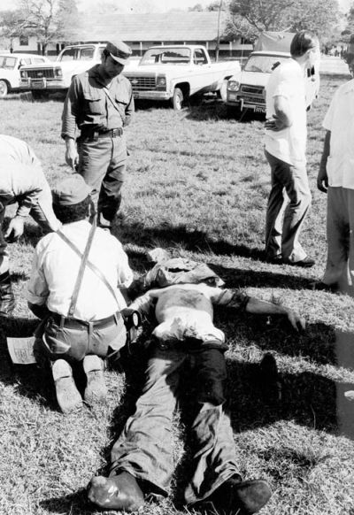 La policía toma las huellas digitales de un combatiente abatido en el ataque al Regimiento de Infantería de Monte 29